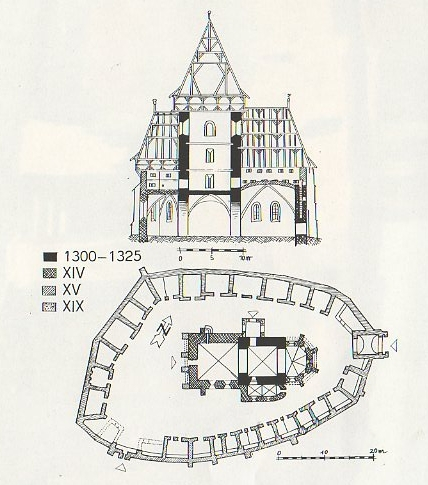 Planul bisericii evanghelice din Axente Sever.